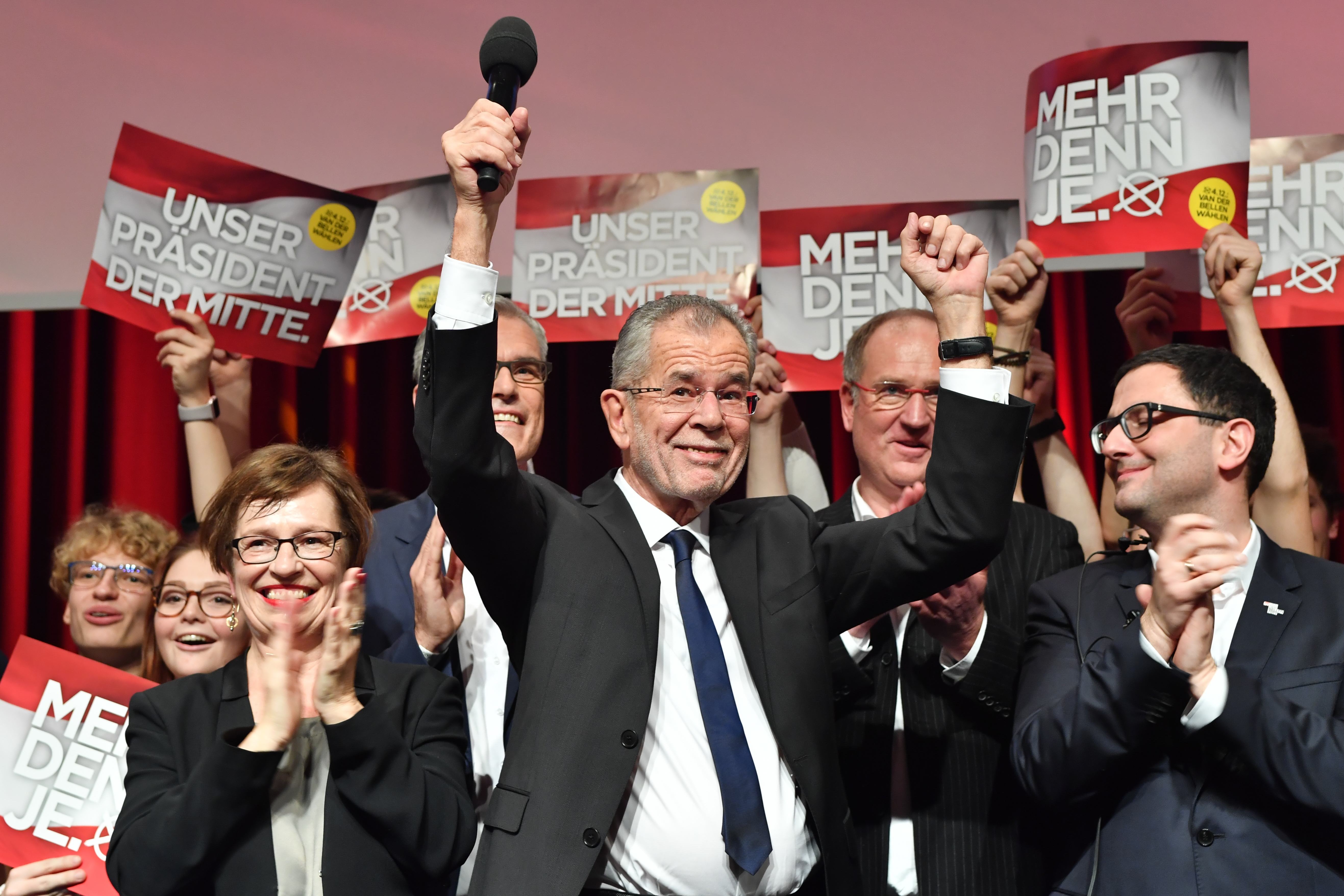 Wahl zum österreichischen Bundespräsidenten am 4. Dezember 2016. Bild zeigt Alexander Van der Bellen und Doris Schmidauer auf der Wahlparty des Team Van der Bellen.